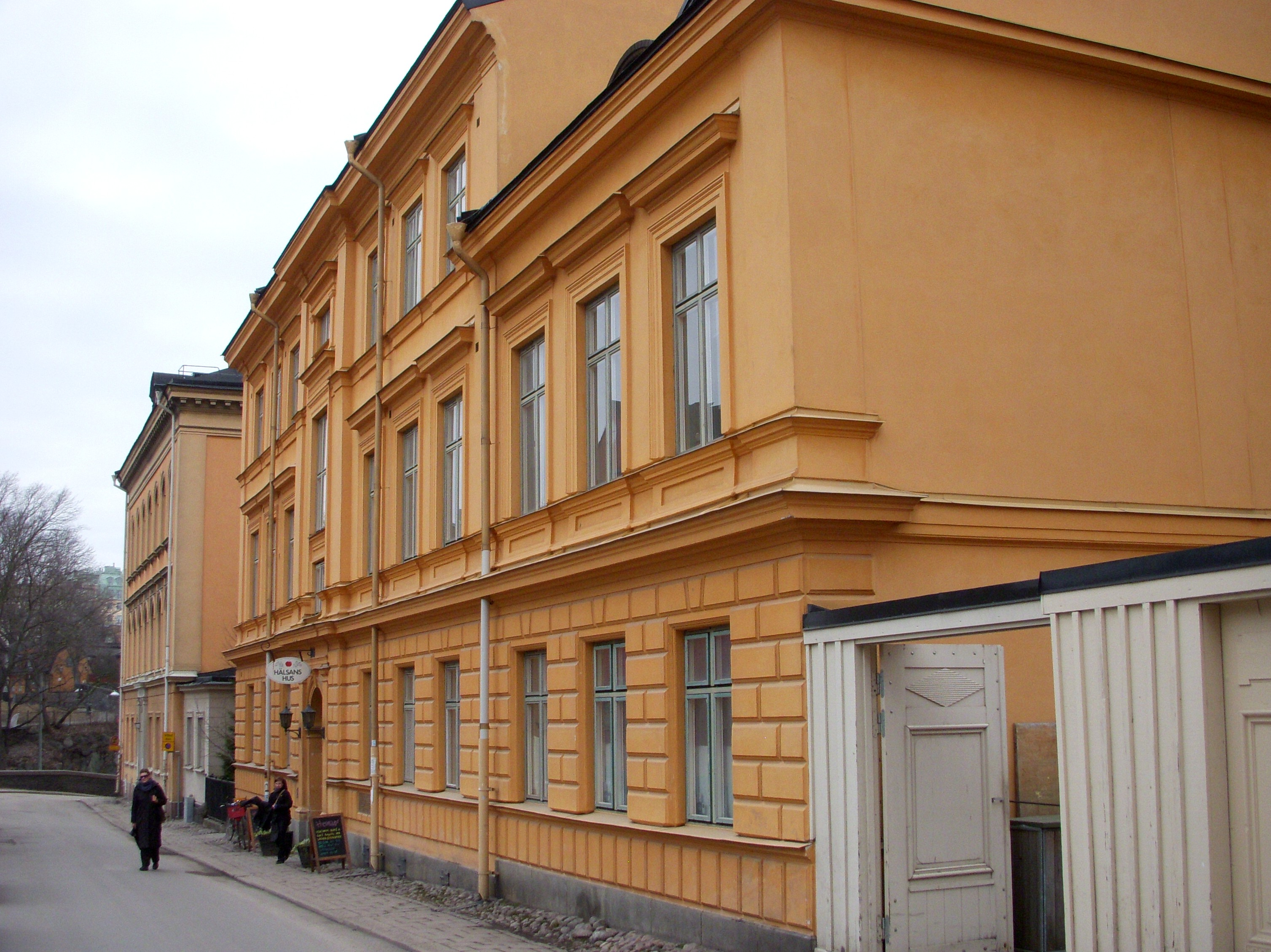 F.d. Radiumhemmet och Stigbergets sjukhus på Fjällgatan 23A och 23B (Hälsans hus närmast i bild)